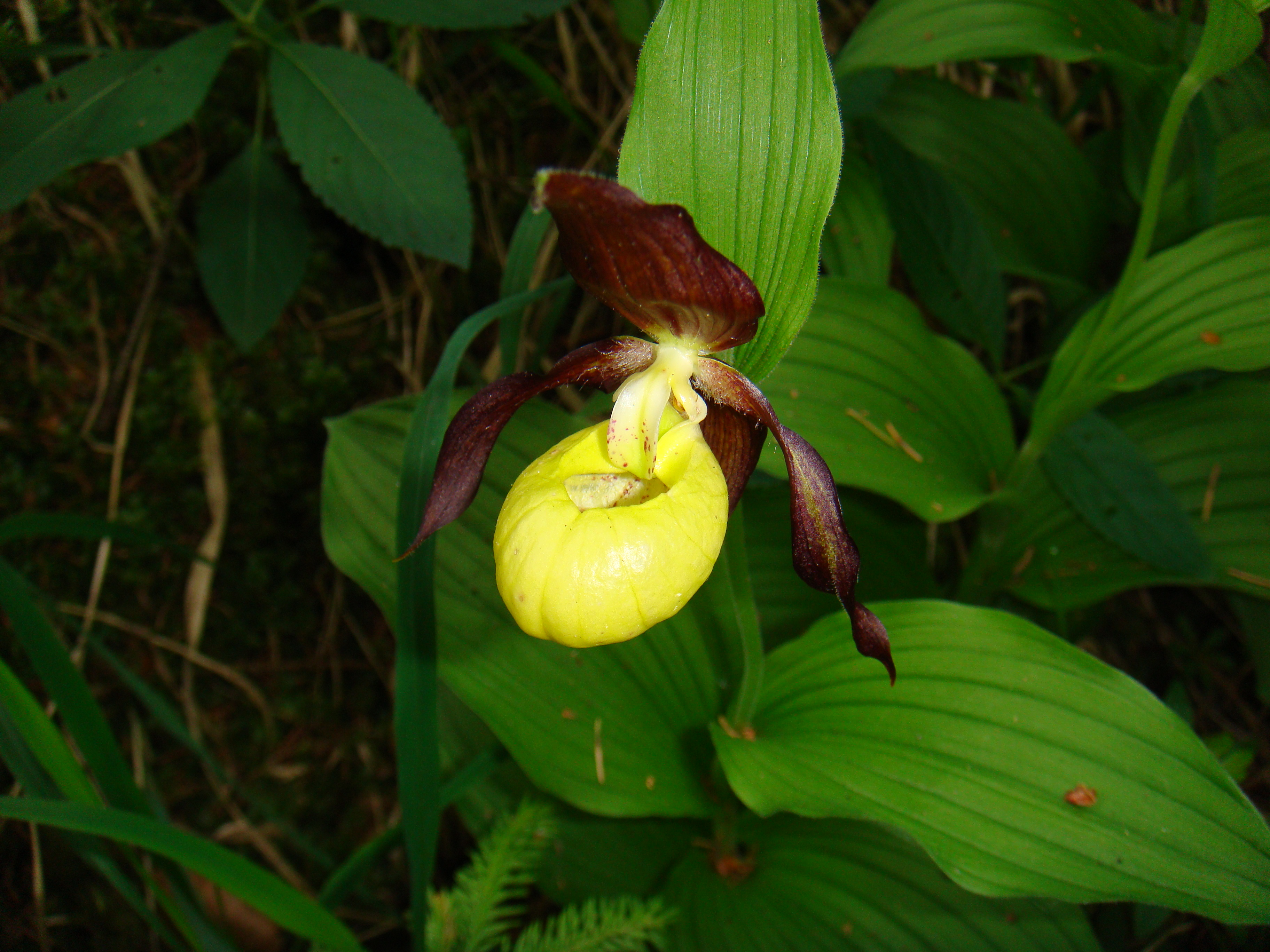 Gelber Frauenschuh (Marien-Frauenschuh) (Cypripedium calceolus) bei Blaubeuren